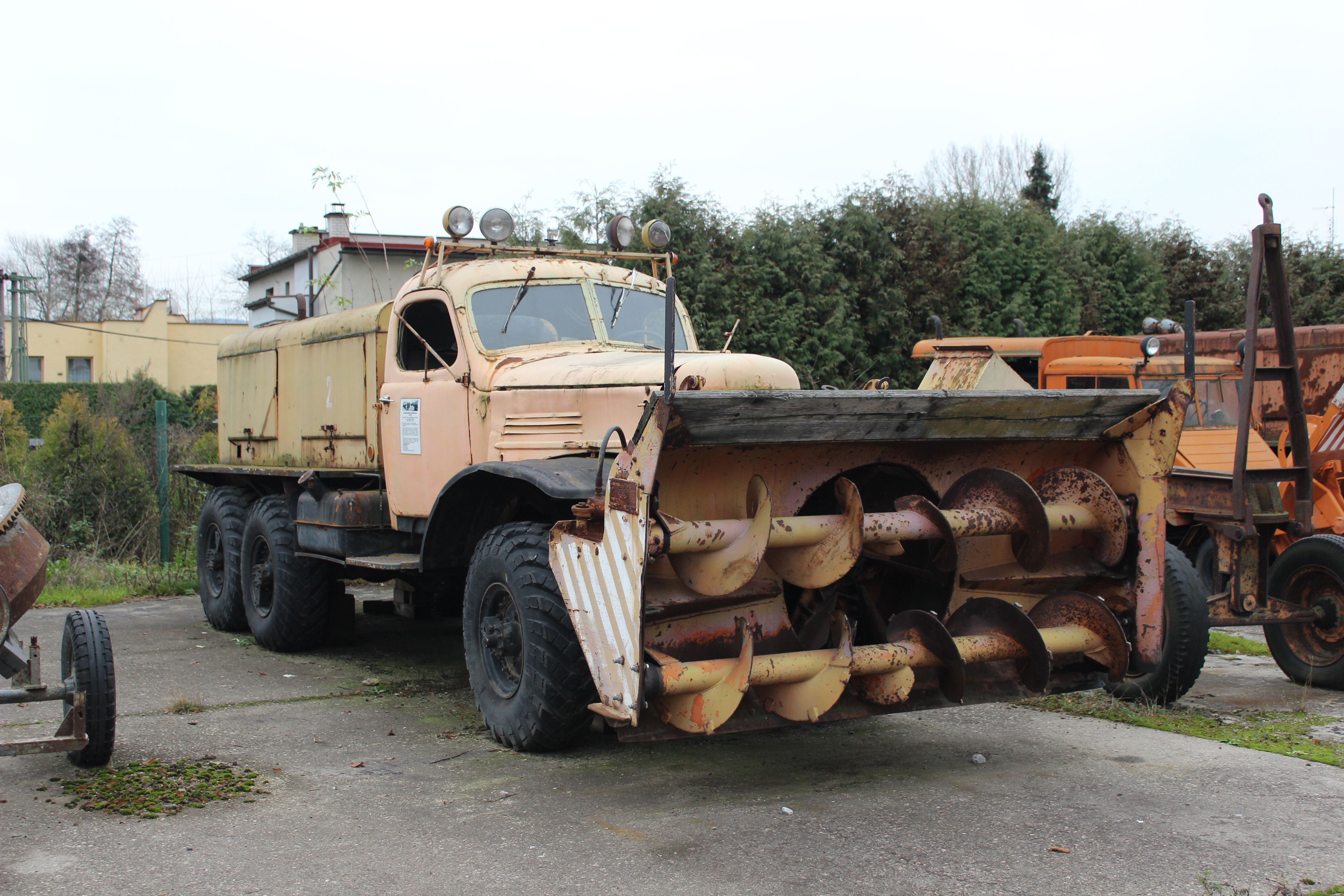 Exponát vystavený v Muzeu silnic ve Vikýřovicích. Add picture: Vikýřovice, Muzeum silnic (35)